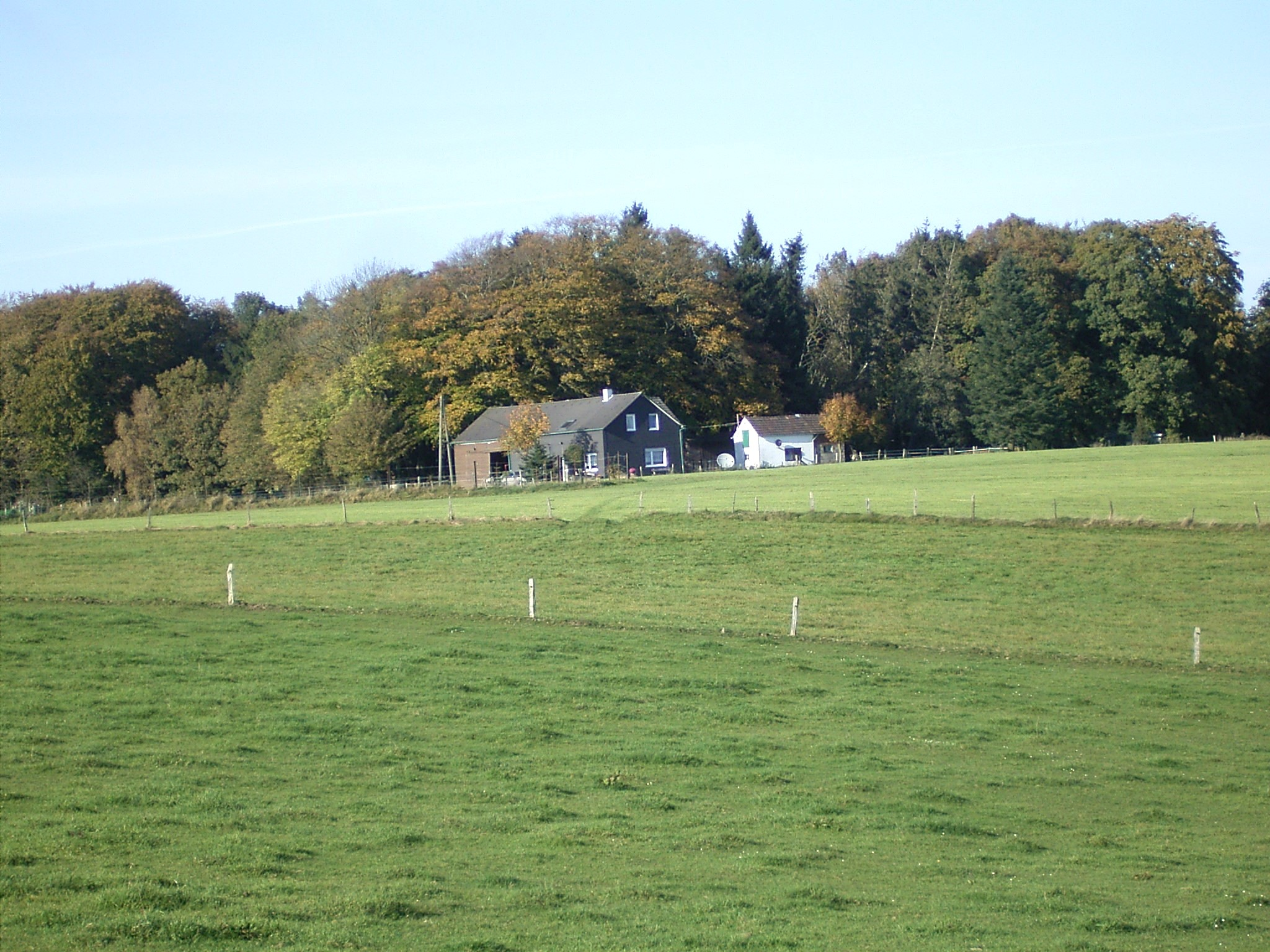 Radevormwald